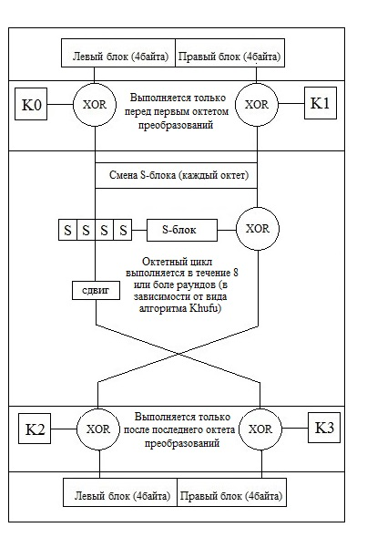 Схема одного октета алгоритма шифрования Khufu